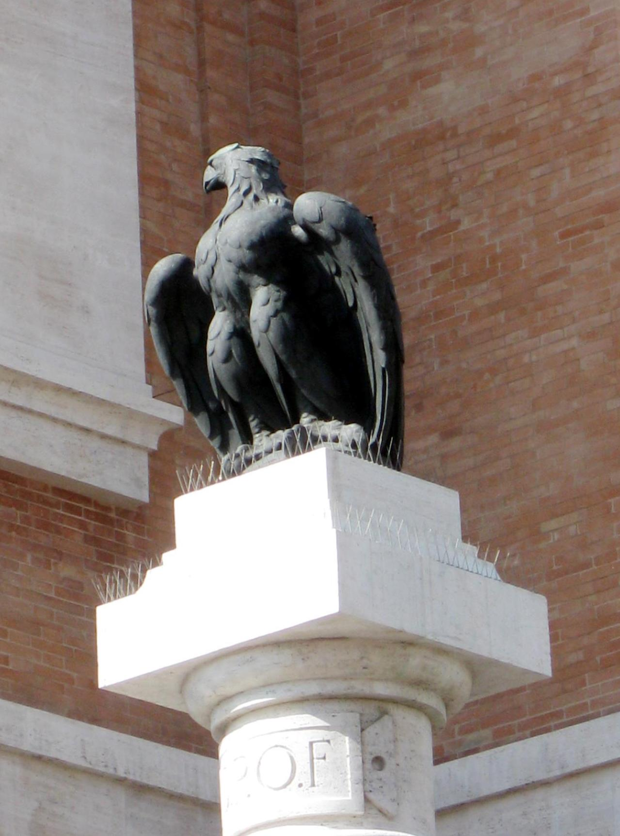 Aquila in bronzo presso il palazzo delle poste a Forlì.